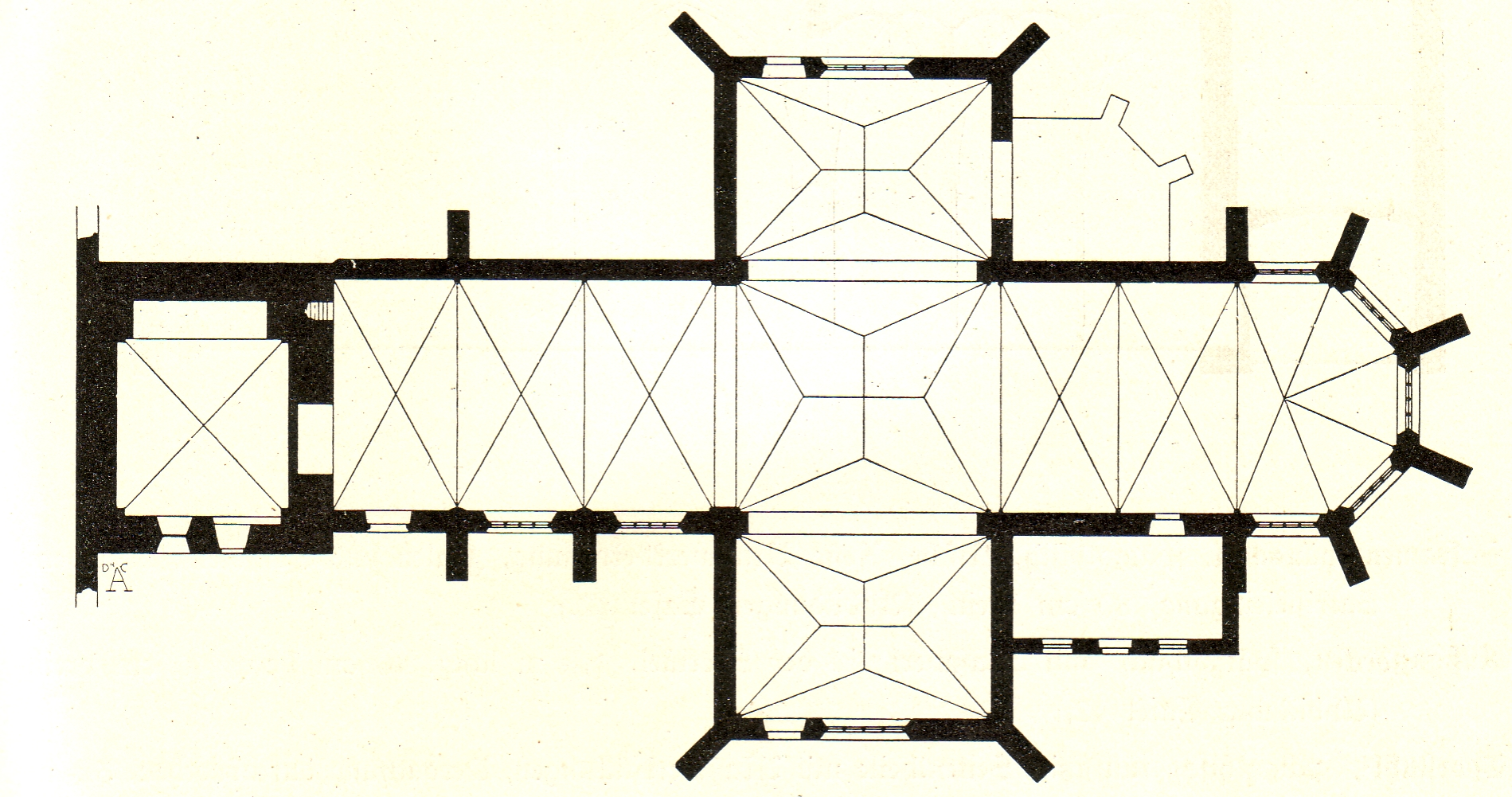 Kloster Liesborn, Grundriss, geplant 1121